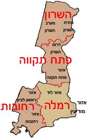 מחוז המרכז, מחולק לנפות